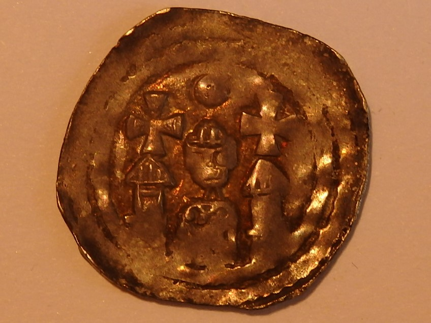 Pfennig, Herzogtum Krain, Berthold v. Meranien (1218-51)